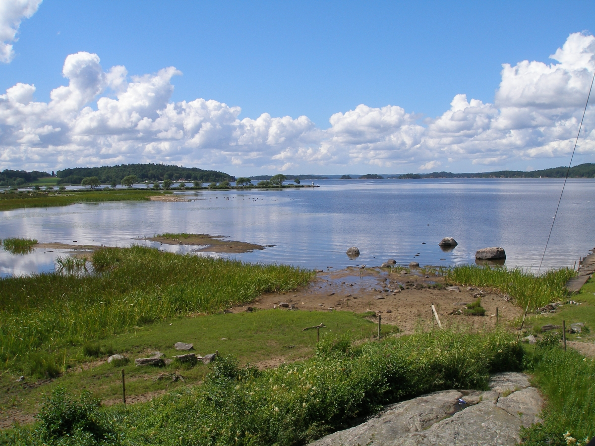 Der schwedische See Mjörn von einer Aussichtsplattform in Nolhaga (Tallhyddan) aus gesehen.